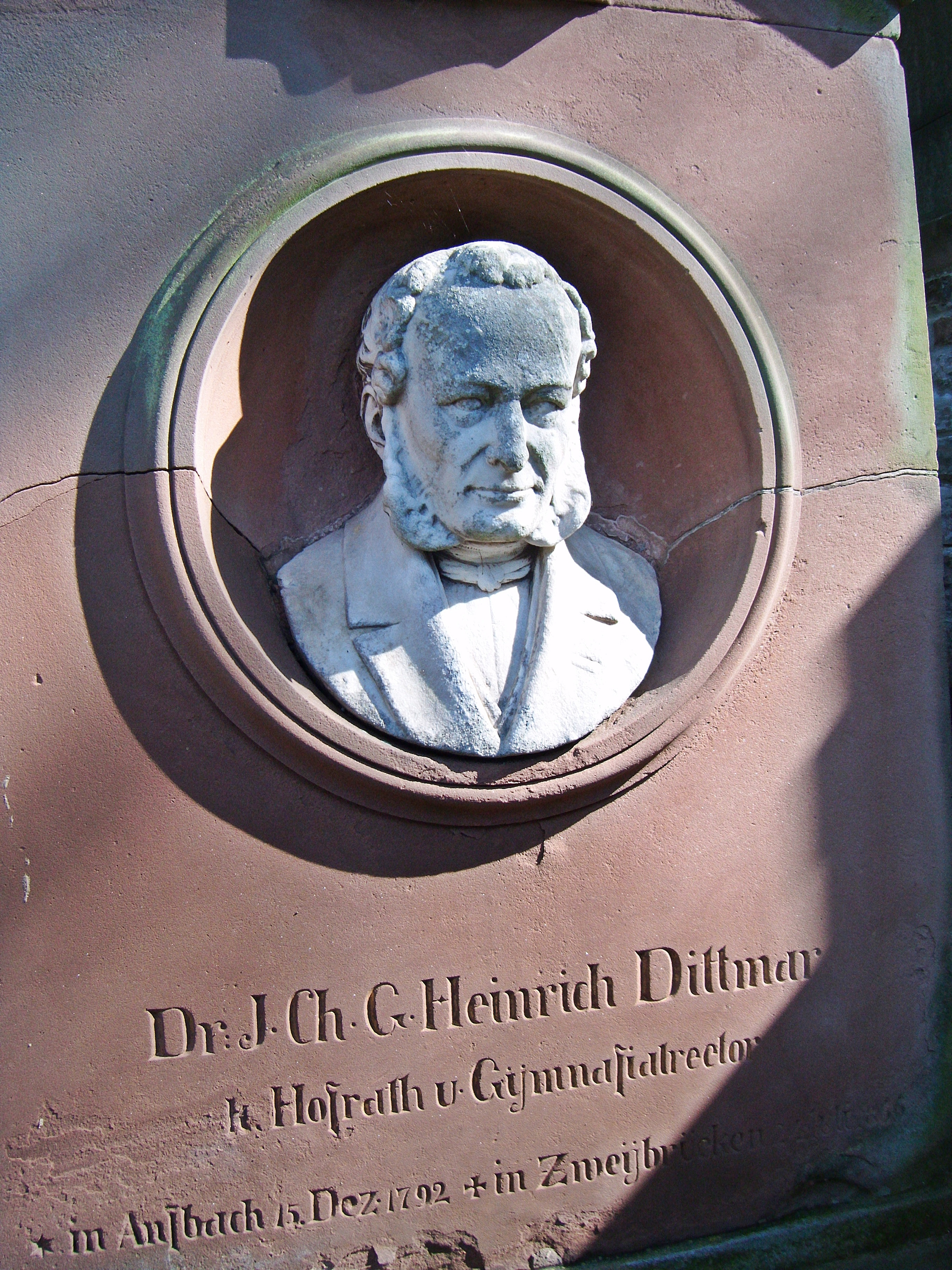 Grabstein des Grünstadter und Zweibrücker Gymnasialdrektors Heinrich Dittmar (1792-1866), Hauptfriedhof Zweibrücken